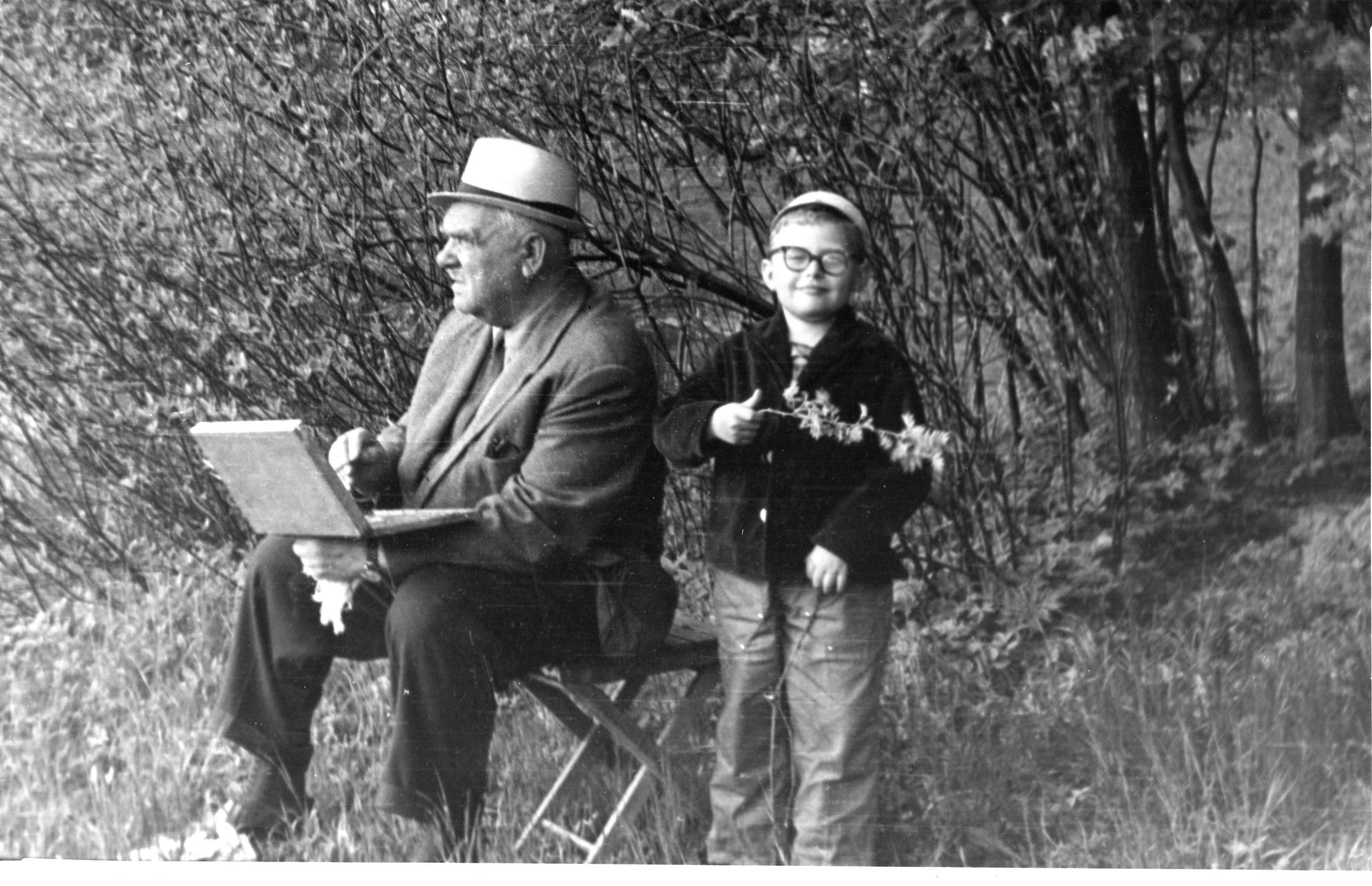 Роберт Иванович Бриченок с внуком Филиппа Фёдоровича Булыкина.